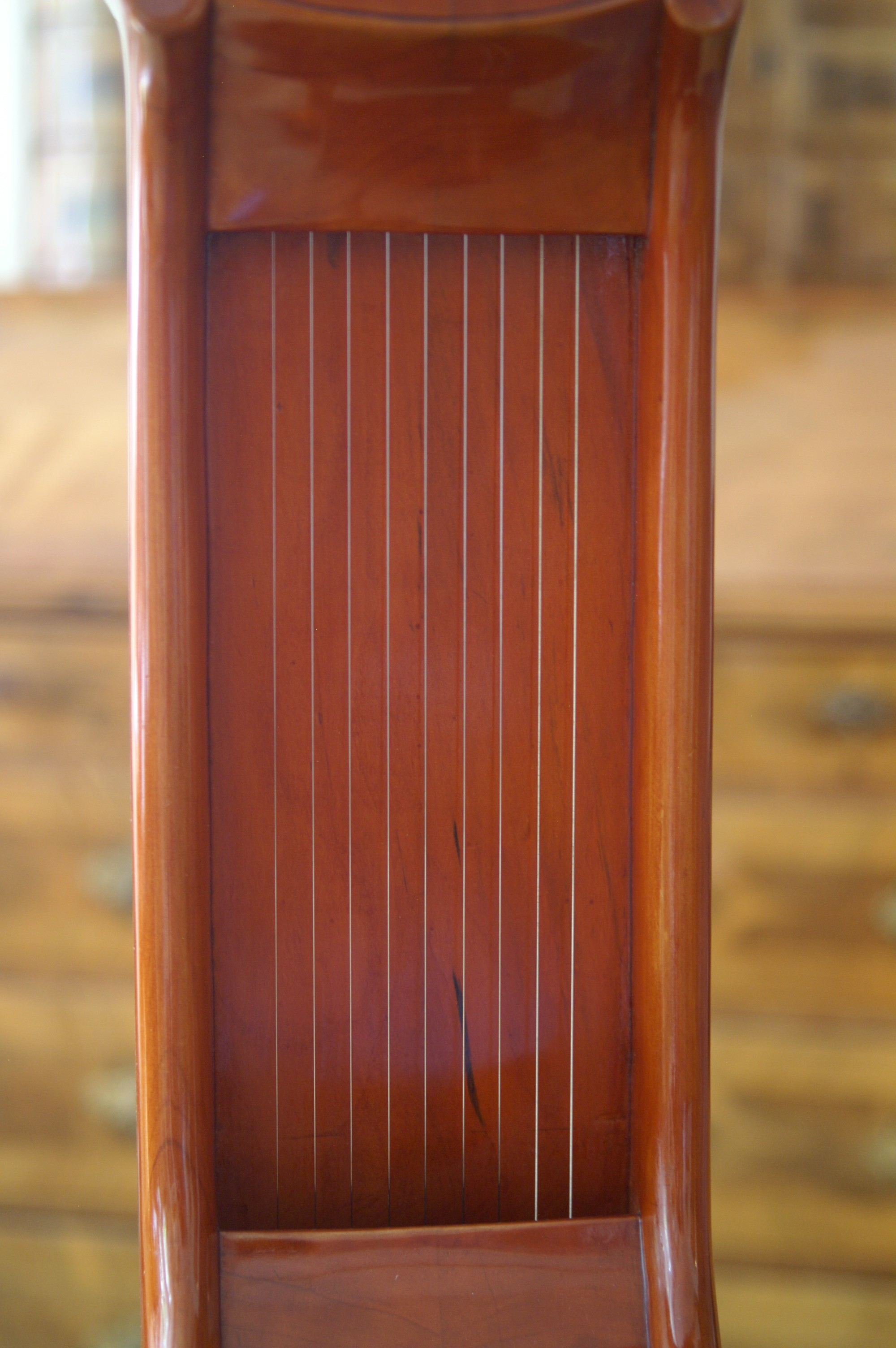 Offene Rückseite eines Halses beim Baryton